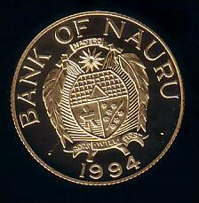 Eigene Fotografie einer Sondermünze der BON